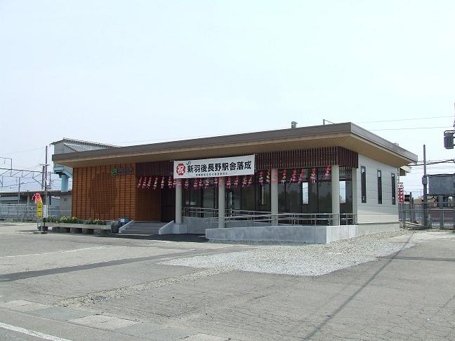 JR羽後長野駅新駅舎